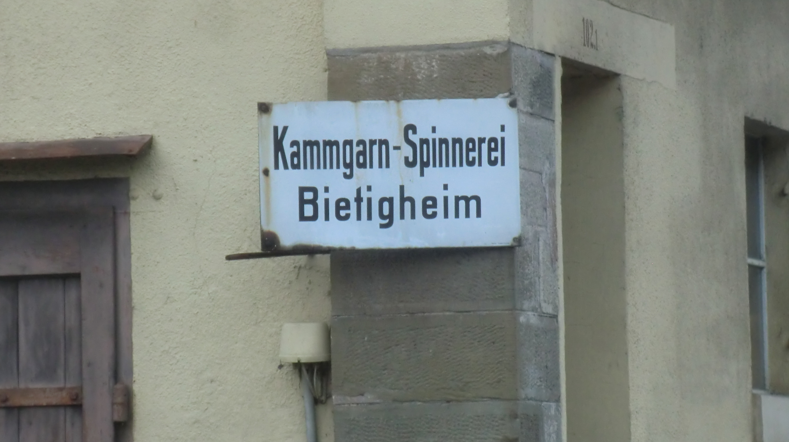 altes Firmenschild